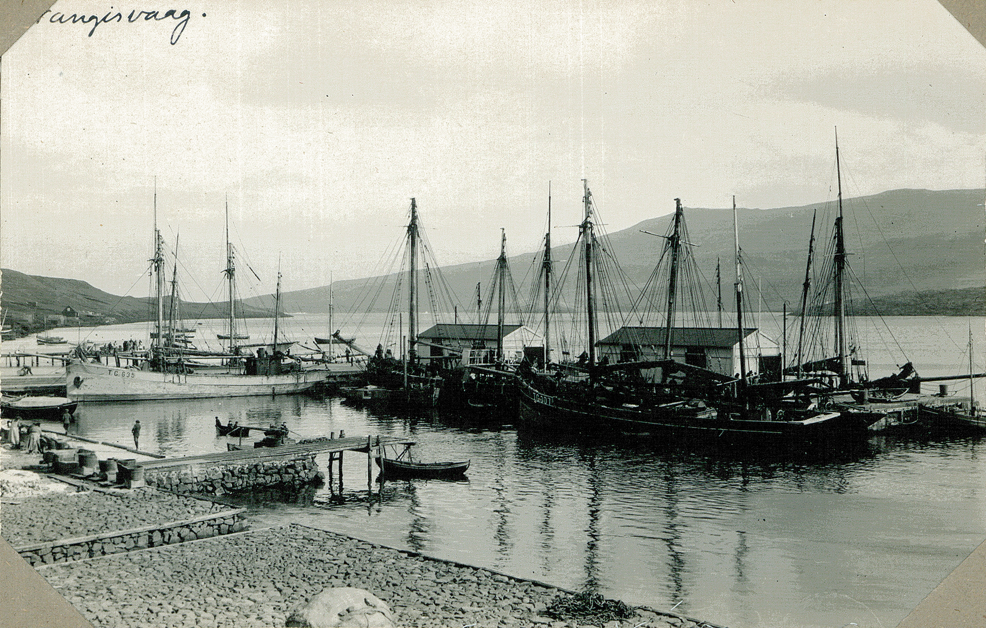 Fotografiet sidder i et fotoalbum lavet af Sophie Petersen med titlen "Færøerne". Fotoalbummet har nummer F5, og indgår i Det Kongelige Danske Geografiske Selskabs arkiv som af resultat af samarbejde mellem Etnografisk Samling og selskabet siden 2010 har været opstillet på Nationalmuseet som et selvstændigt arkiv. Arkivet er administreret af Etnografisk Samling. Det Kongelige Danske Geografiske Selskab har eksisteret siden det blev grundlagt 18. november 1876. Dets formål var at medvirke til “så vel at fremme kendskabet til jorden og dens beboere som at udbrede interessen for den geografiske videnskab” I arkivet findes blandt andet breve, dagbøger, regnskaber, kort og foredragsmanuskripter. Derudover indeholder arkivet over 70.000 fotografier.